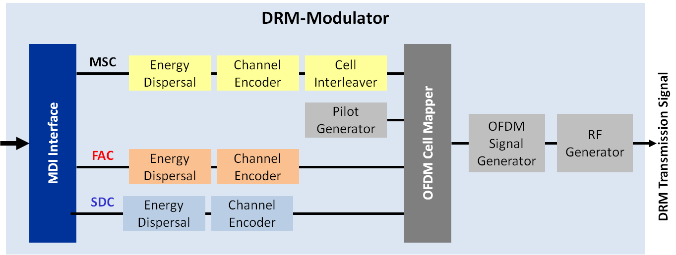 DRM-Adjacent-Channel-Simulcast - Schema des DRM-Modulators